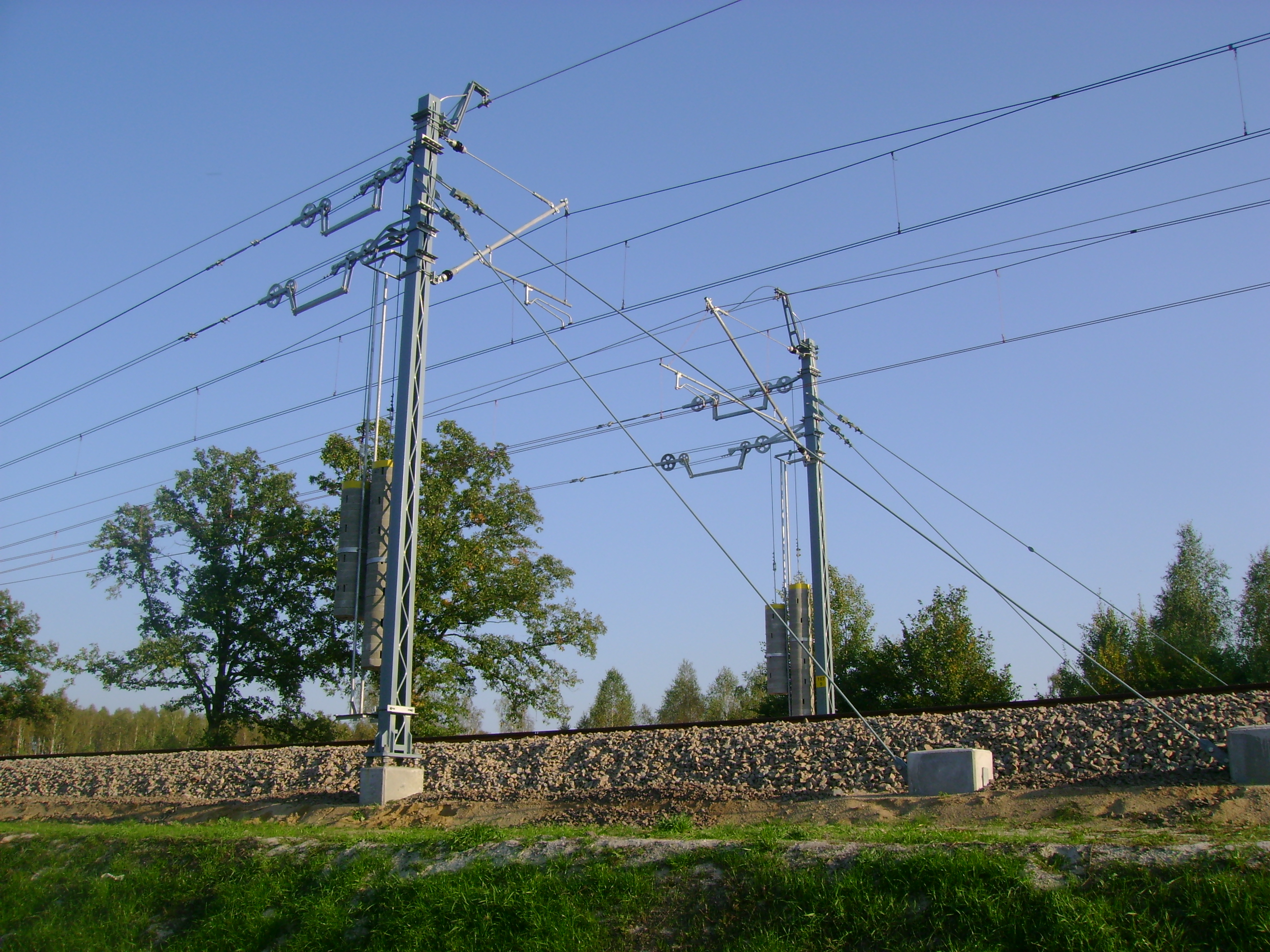 Elementy sieci trakcyjnej na trasie drogi kolejowej nr. 2.